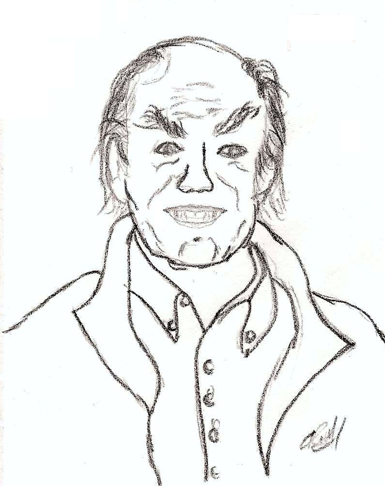 Dibujo a Grafito de Antonio "El Loco" Valdés